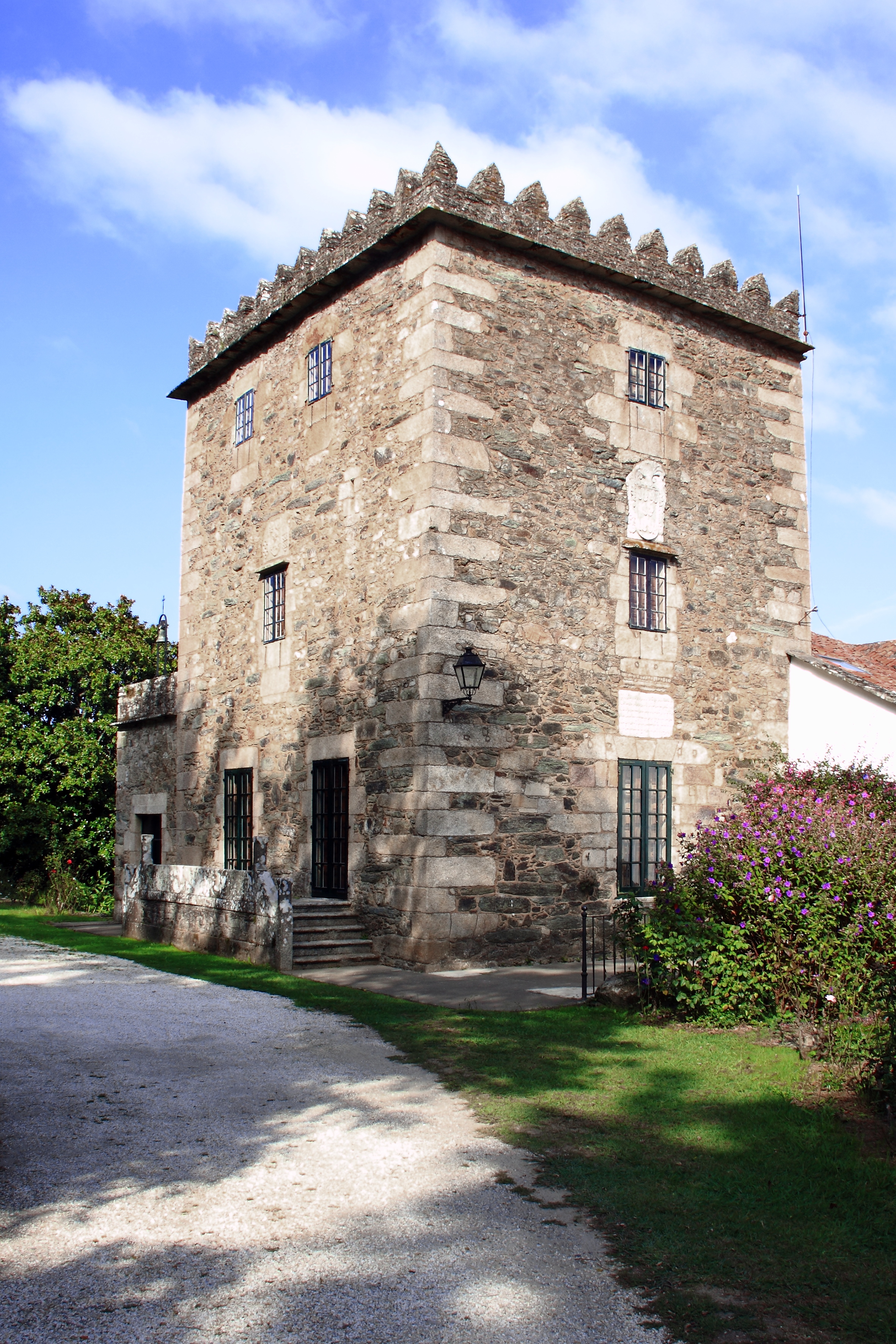 Torre del Pazo de Figueroa - Abegondo (A Coruña)